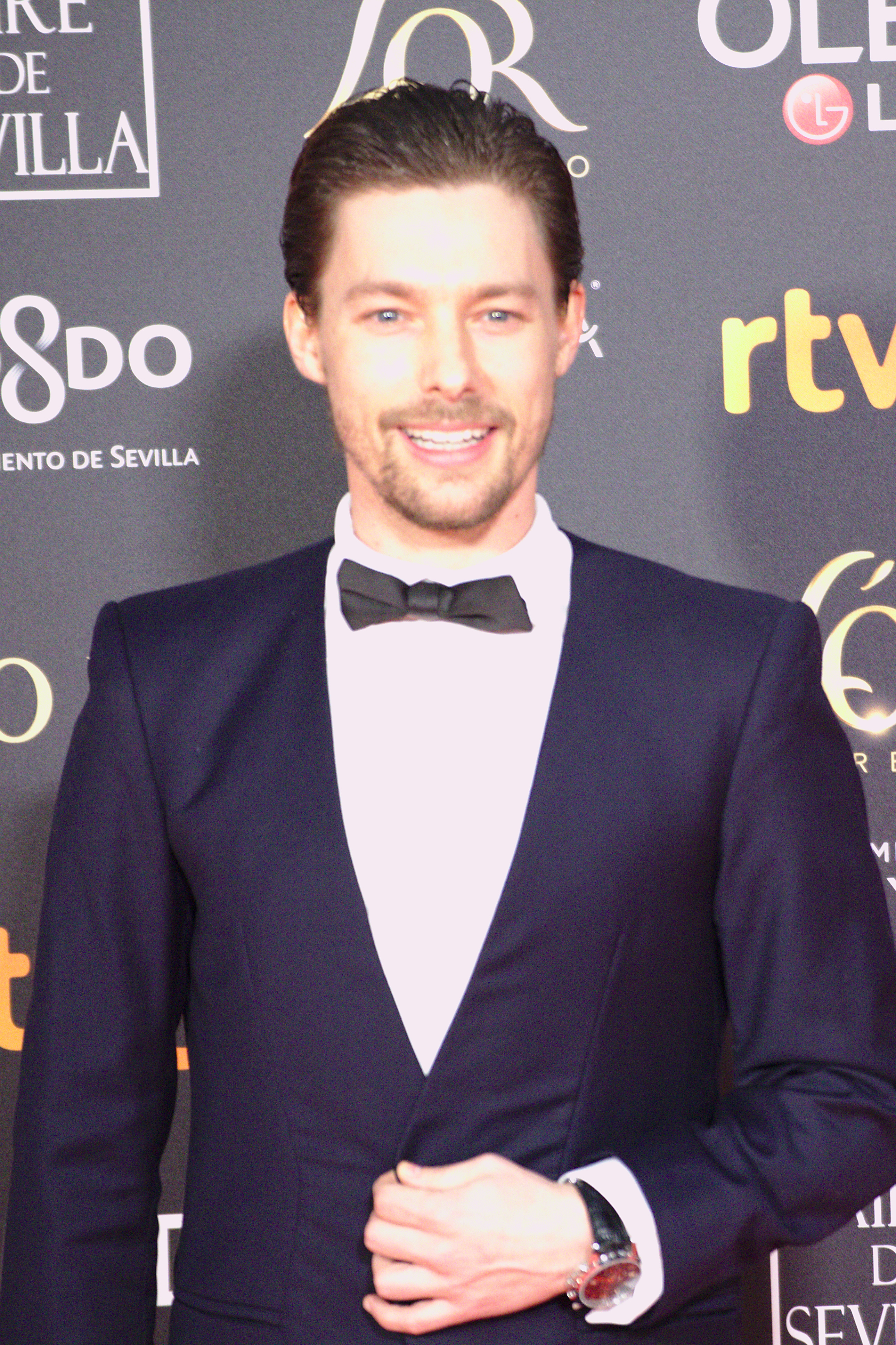 Jan Cornet en la alfombra roja de los Premios Goya celebrados en Sevilla en Febrero 2019